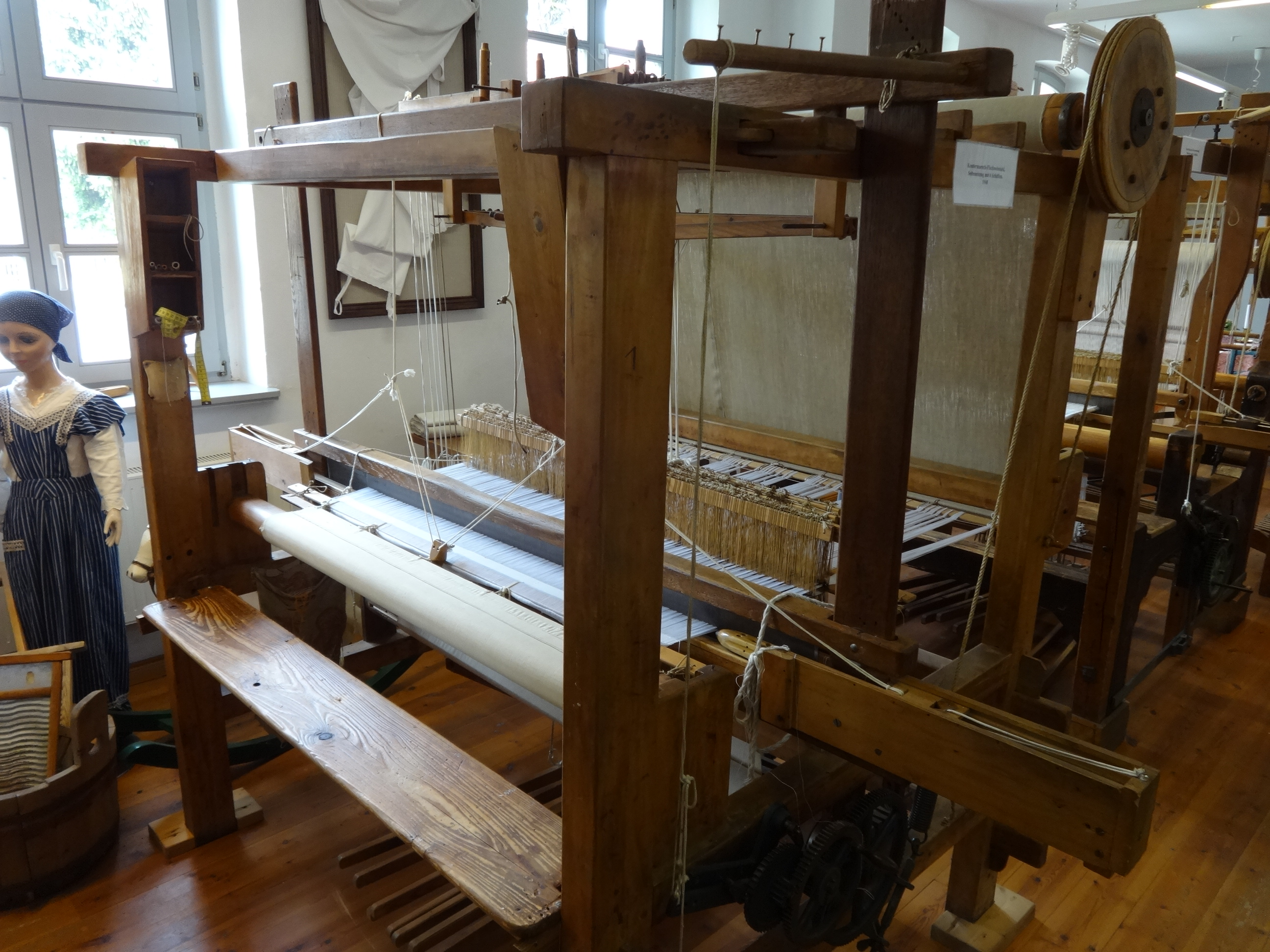 Die Manufaktur der Weberkolonie entstand als Fabrikantenhaus für Weber im Jahr 1776. Im 19. und 20. Jahrhundert wurde es als Schule und Jugendheim genutzt. Im 21. Jahrhundert befindet sich in dem Bauwerk ein Weberei-Museum sowie ein Restaurant.